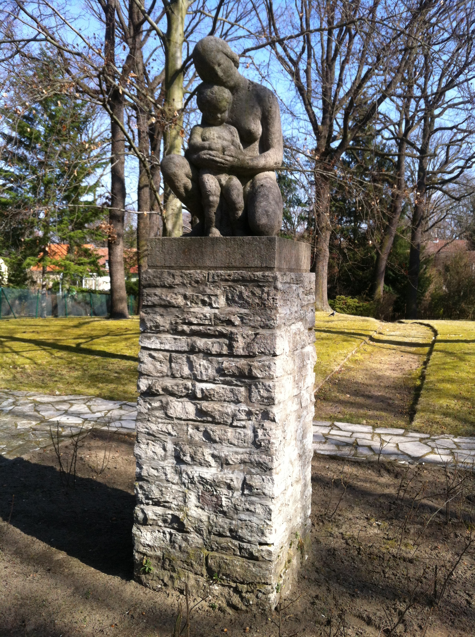 hinter Rieppelstr. 8